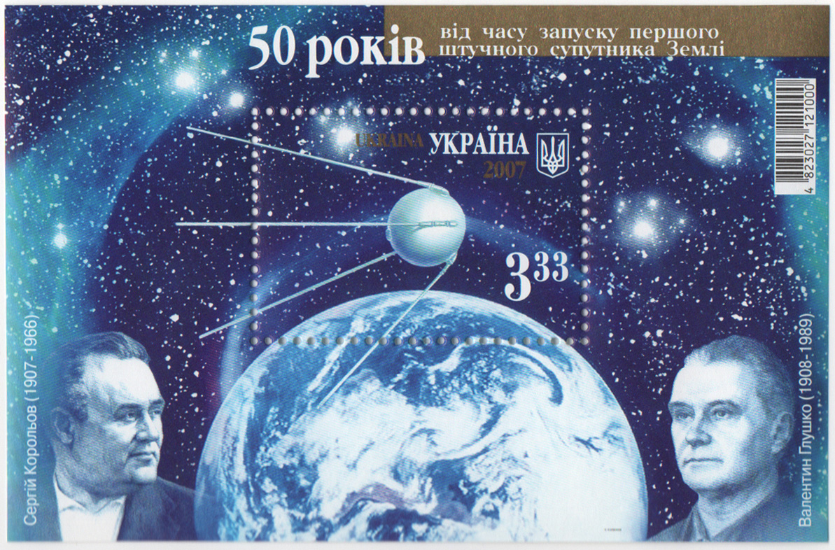 Почтовая марка Украины - Королёв и Глушко, Герои Социалистического Труда